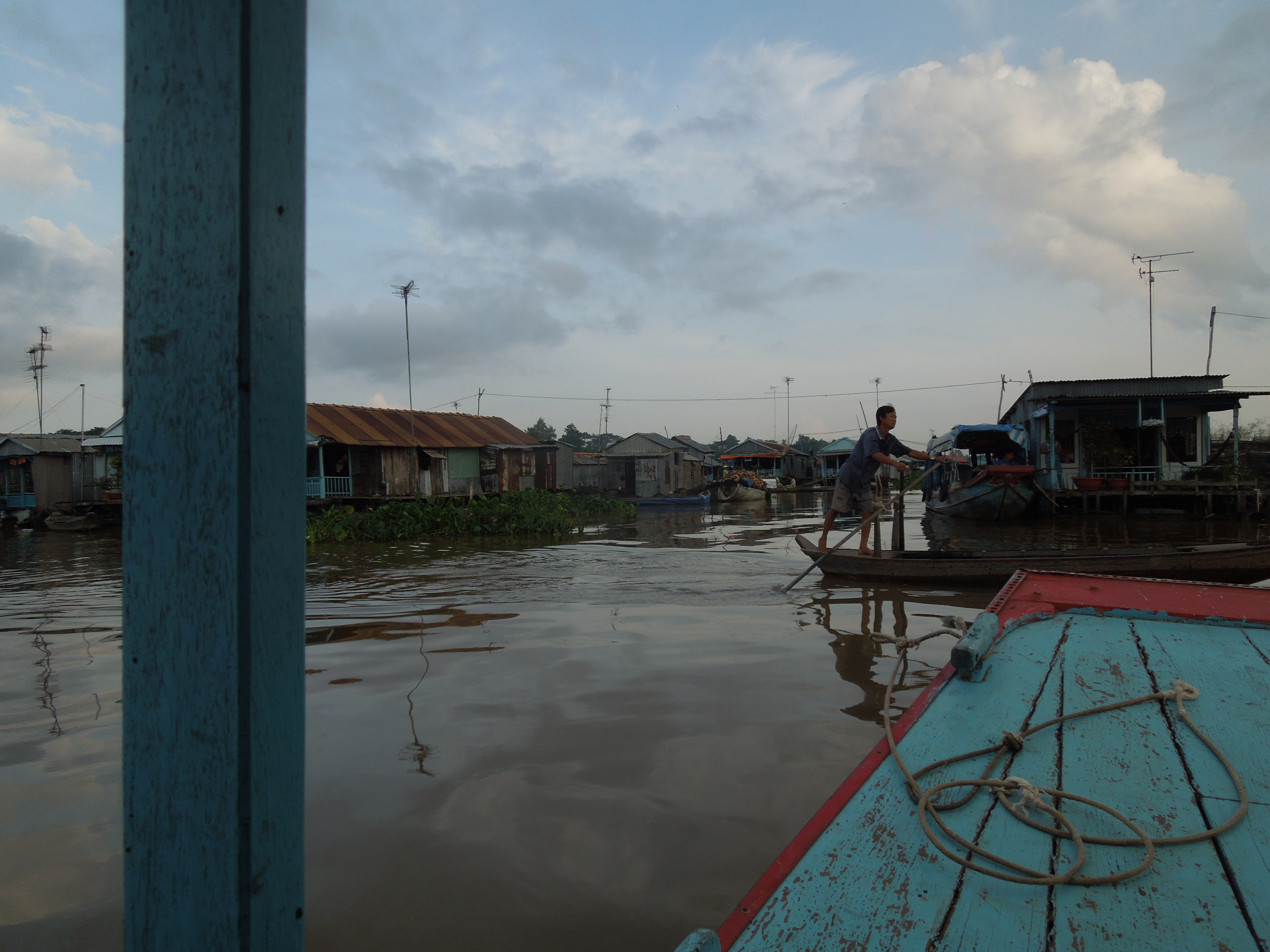 ベトナム、アンザン省チャウドックの水上生活者の集落